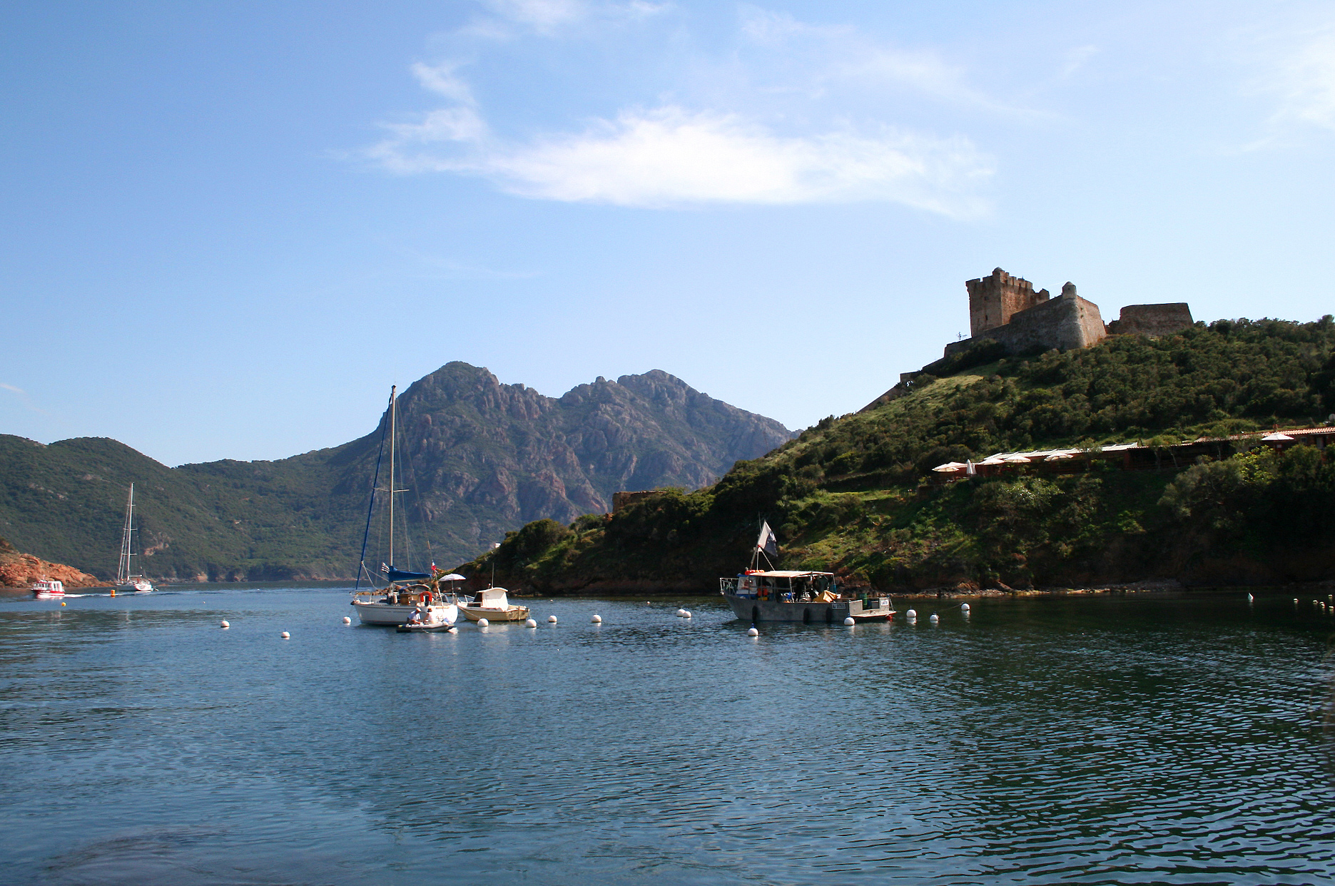 Osani ( Corse-du-Sud) - France, le port, la forteresse génoise et le Golfe de Girolata.